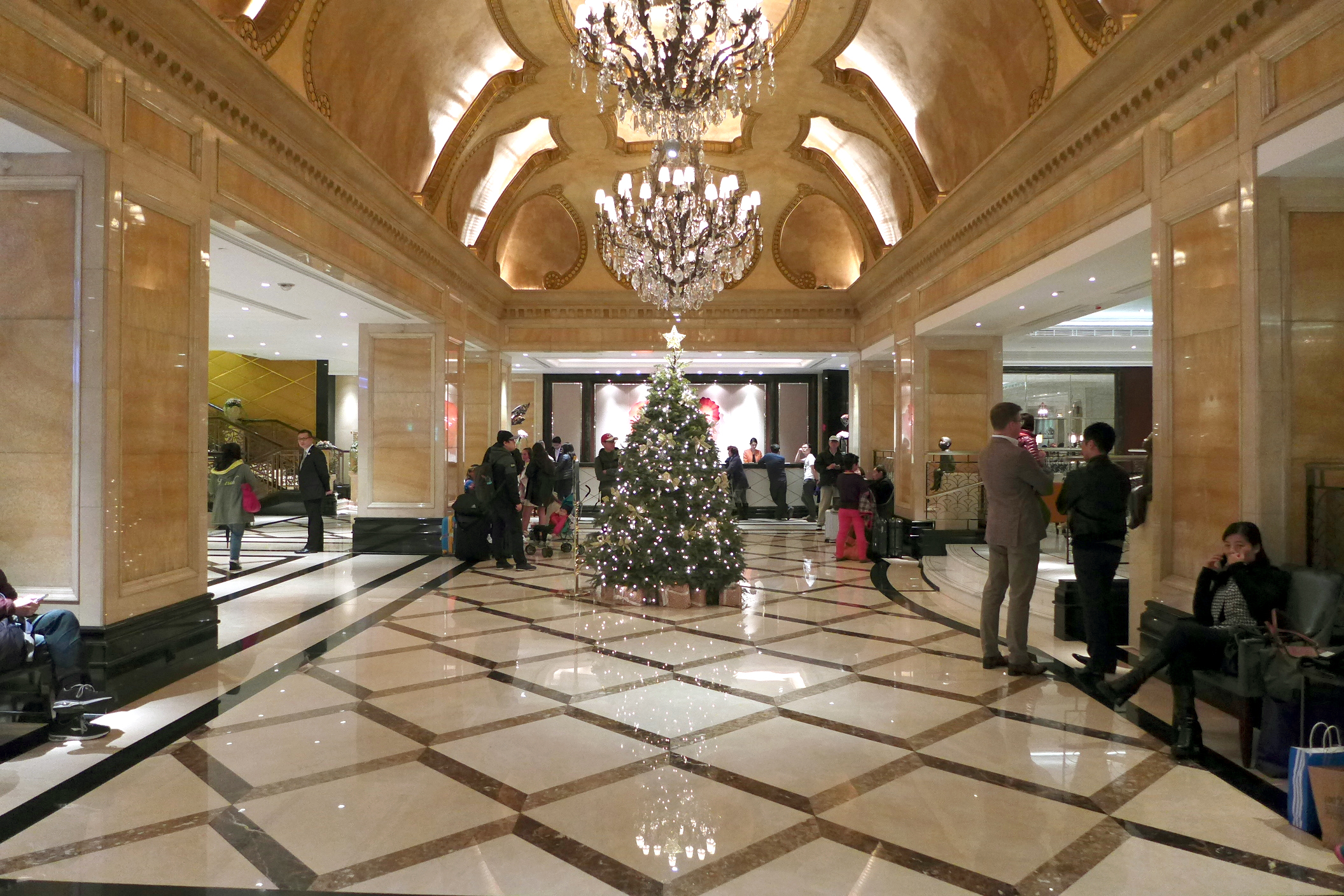 Langham Hotel, Hong Kong Lobby